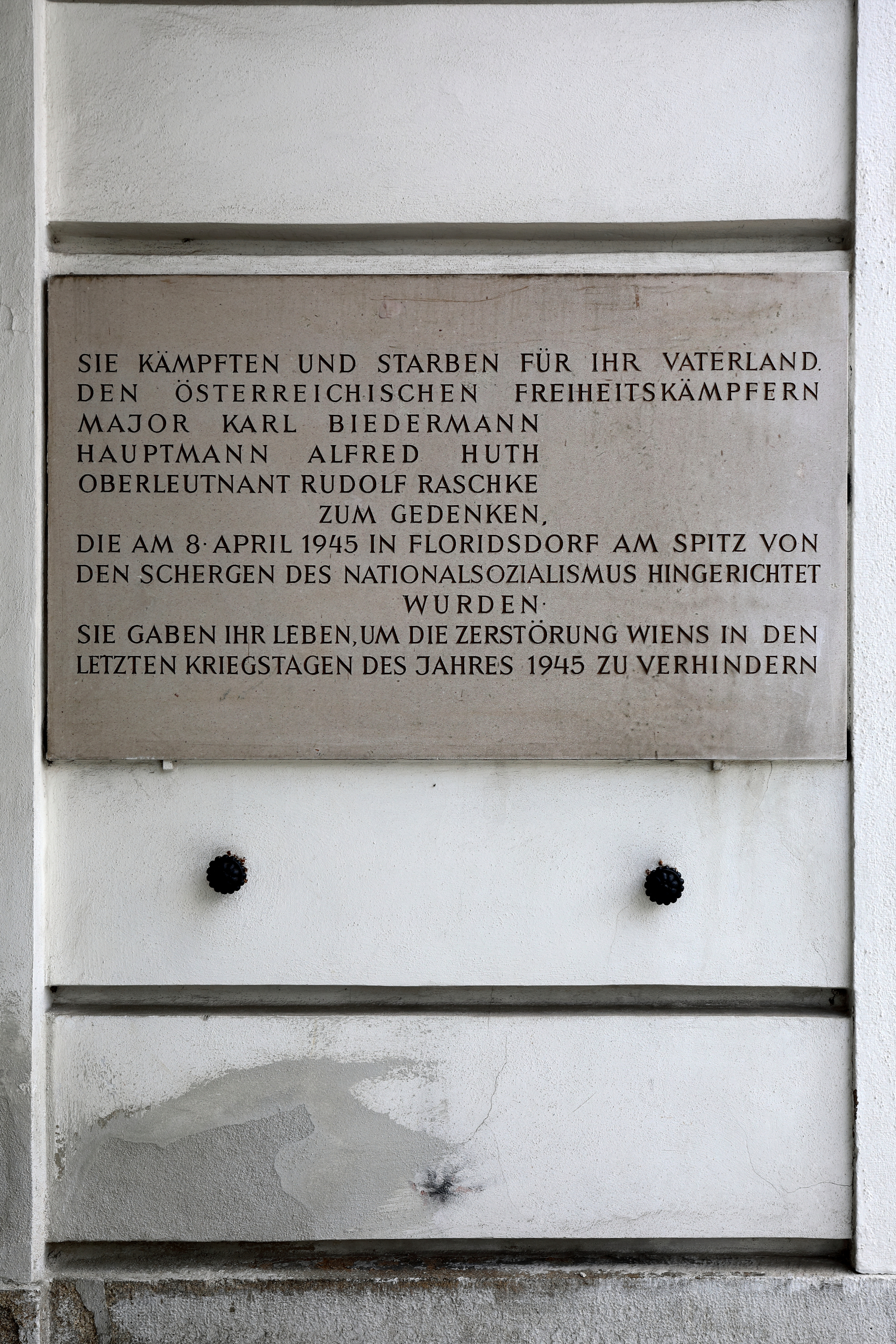 Gedenktafel für die als Verräter hingerichteten Wehrmachtsoffiziere Biedermann, Huth und Raschke beim Haupteingang des Floridsdorfer Bezirksamtes im 21. Gemeindebezirk Floridsdorf. Ein alter Gedenkstein, gestiftet von der Bezirksgruppe Floridsdorf des Landesverbands Wien des Bundesverbandes österreichischer Widerstandskämpfer und Opfer des Faschismus (KZ-Verband), wurde am 8. April 1950 enthüllt. Dieser musste aus verkehrstechnischen Gründen 1962 abgetragen werden und als Ersatz wurde 1964 die Tafel beim Amtshaus angebracht.